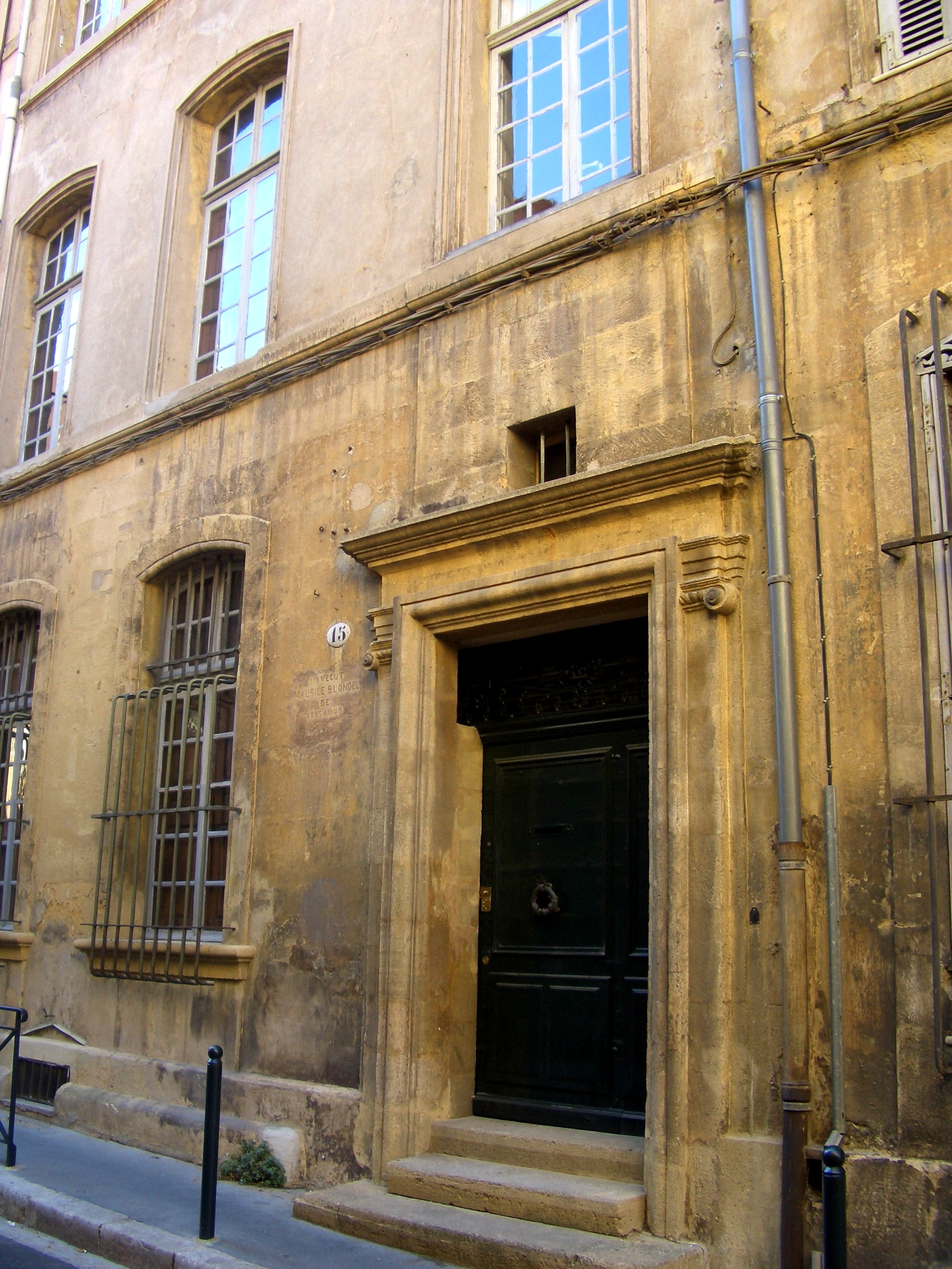 La casa in cui visse Maurice Blondel. Foto scattata da me a Aix en Provence il 19.8.07